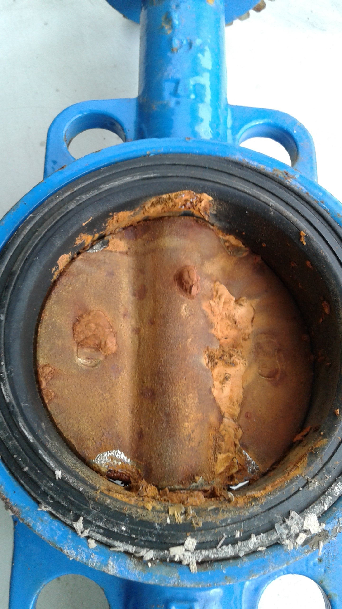 Засувка водяна